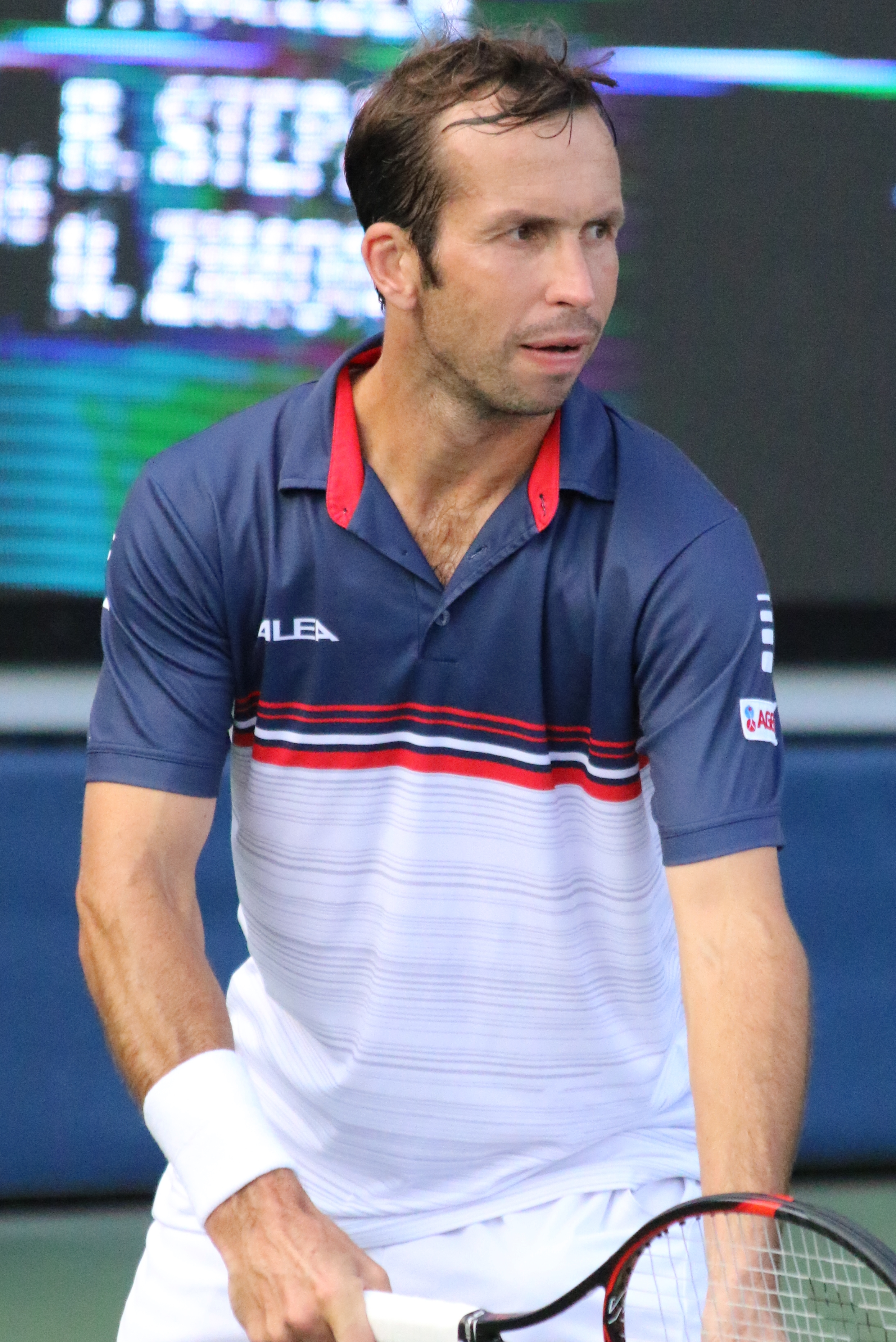 Stepanek US16 (17)